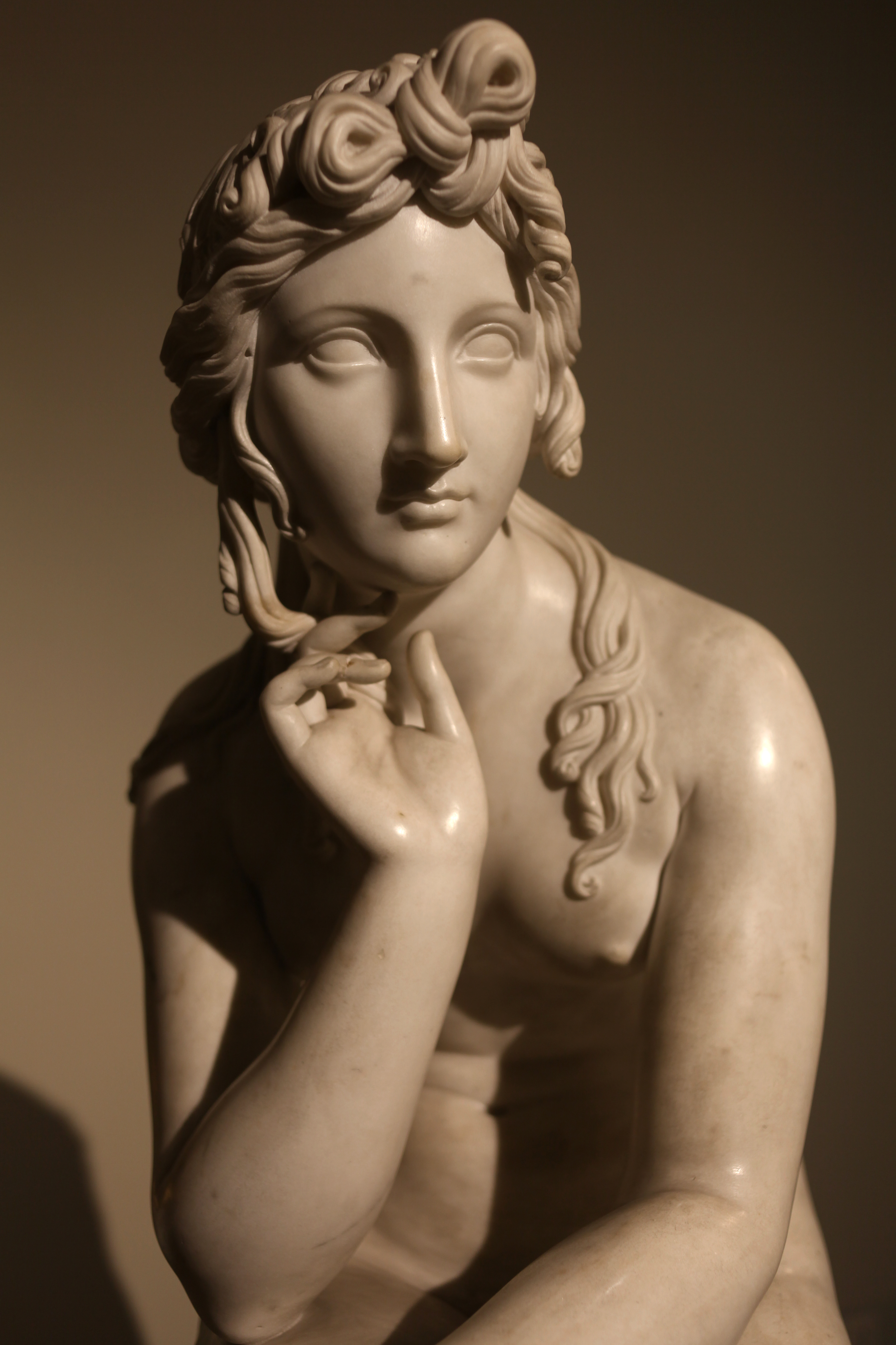 Cincinnato Baruzzi (1796.1878) Eva tentata dal serpentente (1836), particolare